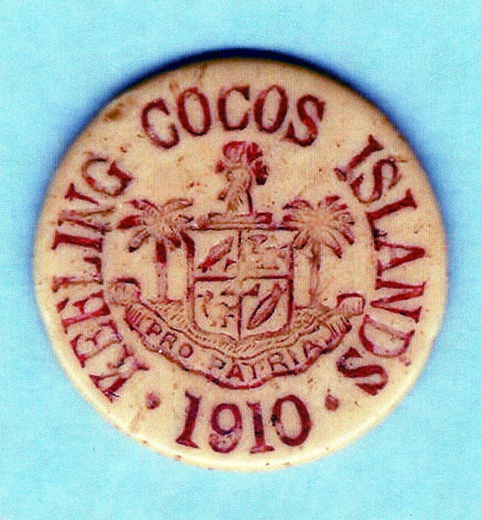 moneta delle isole Cocos (Australia) del 1910